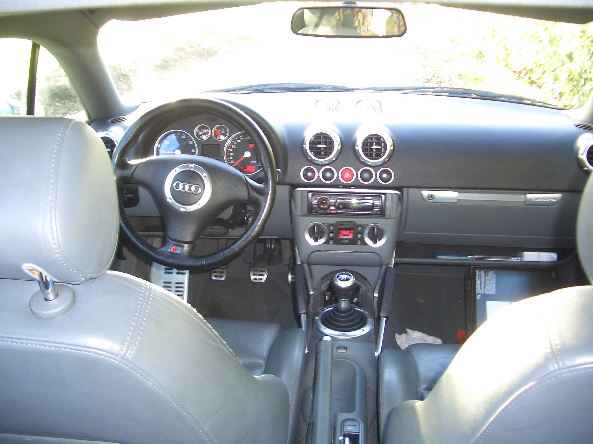 Inside an Audi TT 1999